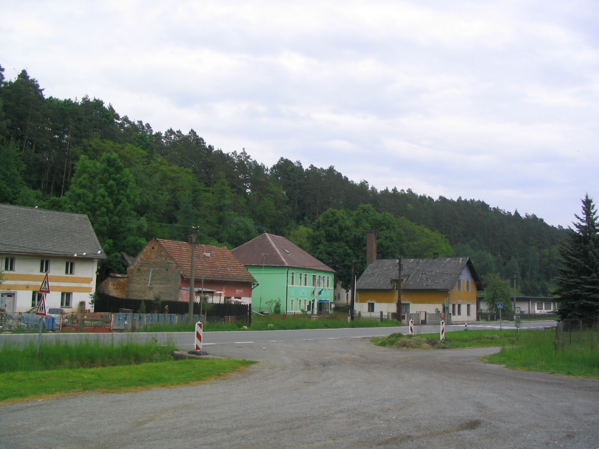 Village of Dolní Krupá, Czech Republic